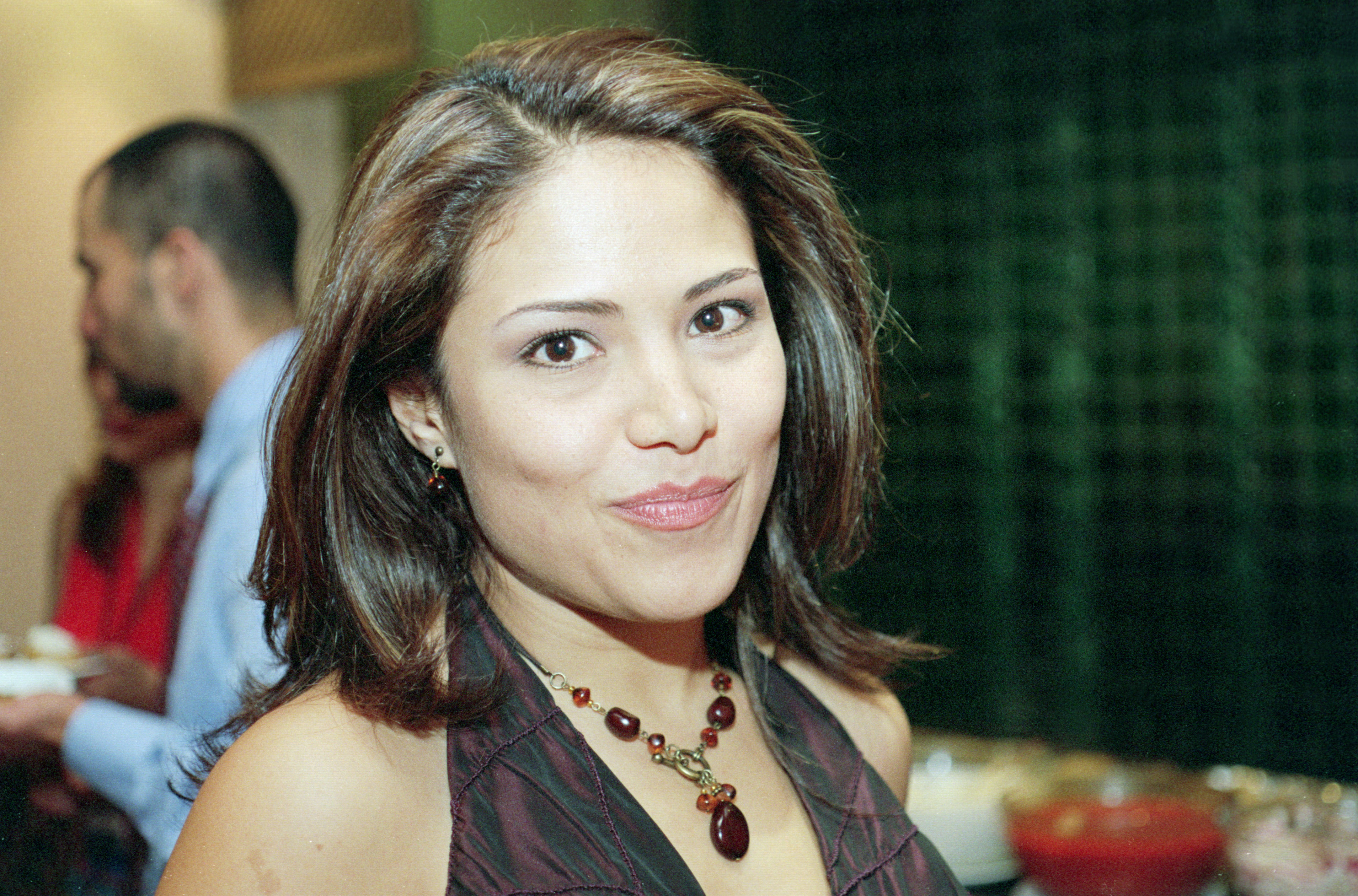 Vanessa Bauche 05